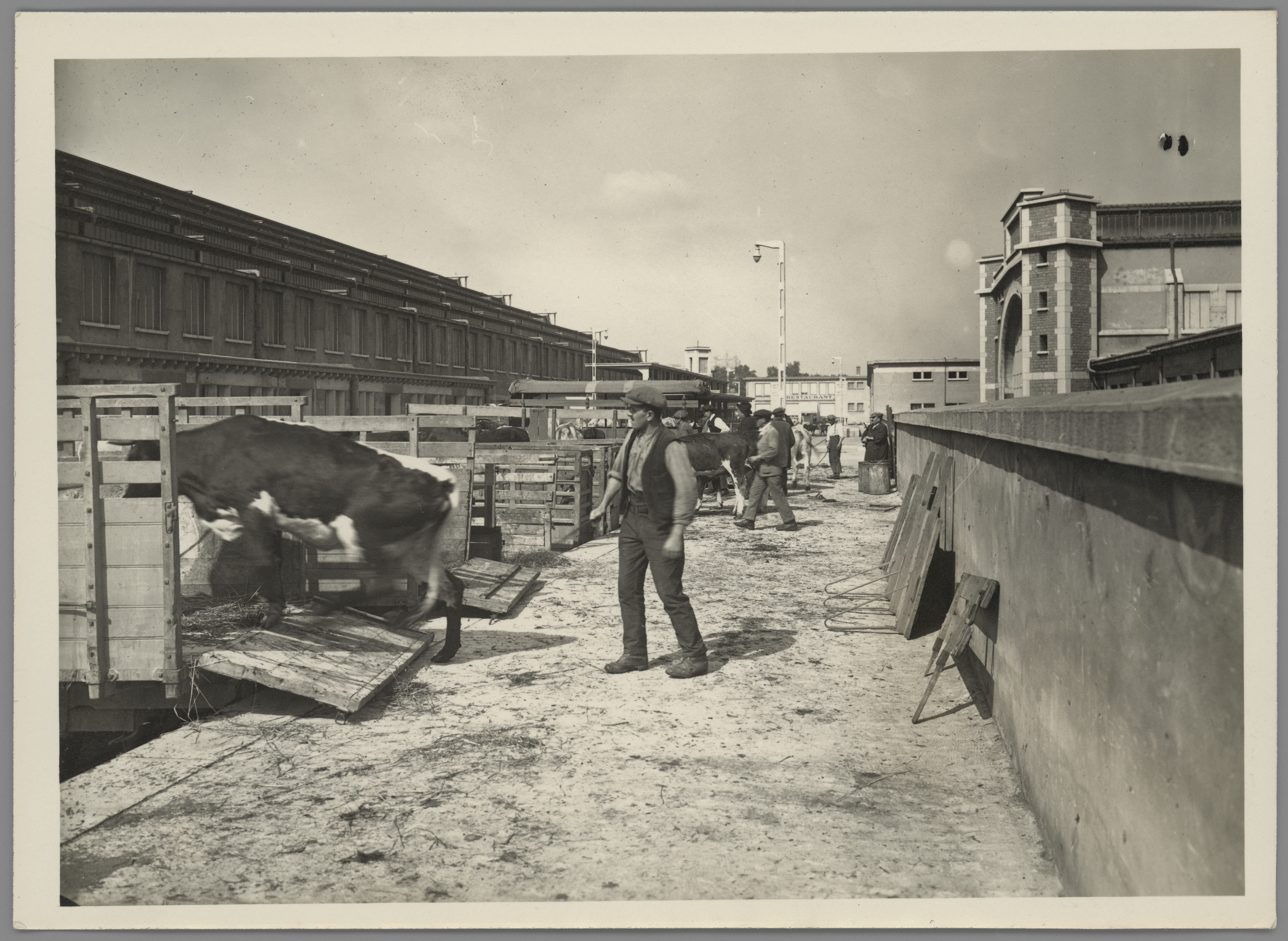 Photographie des abattoirs et du marché aux bestiaux de la Mouche. Cote 1108WP/4.